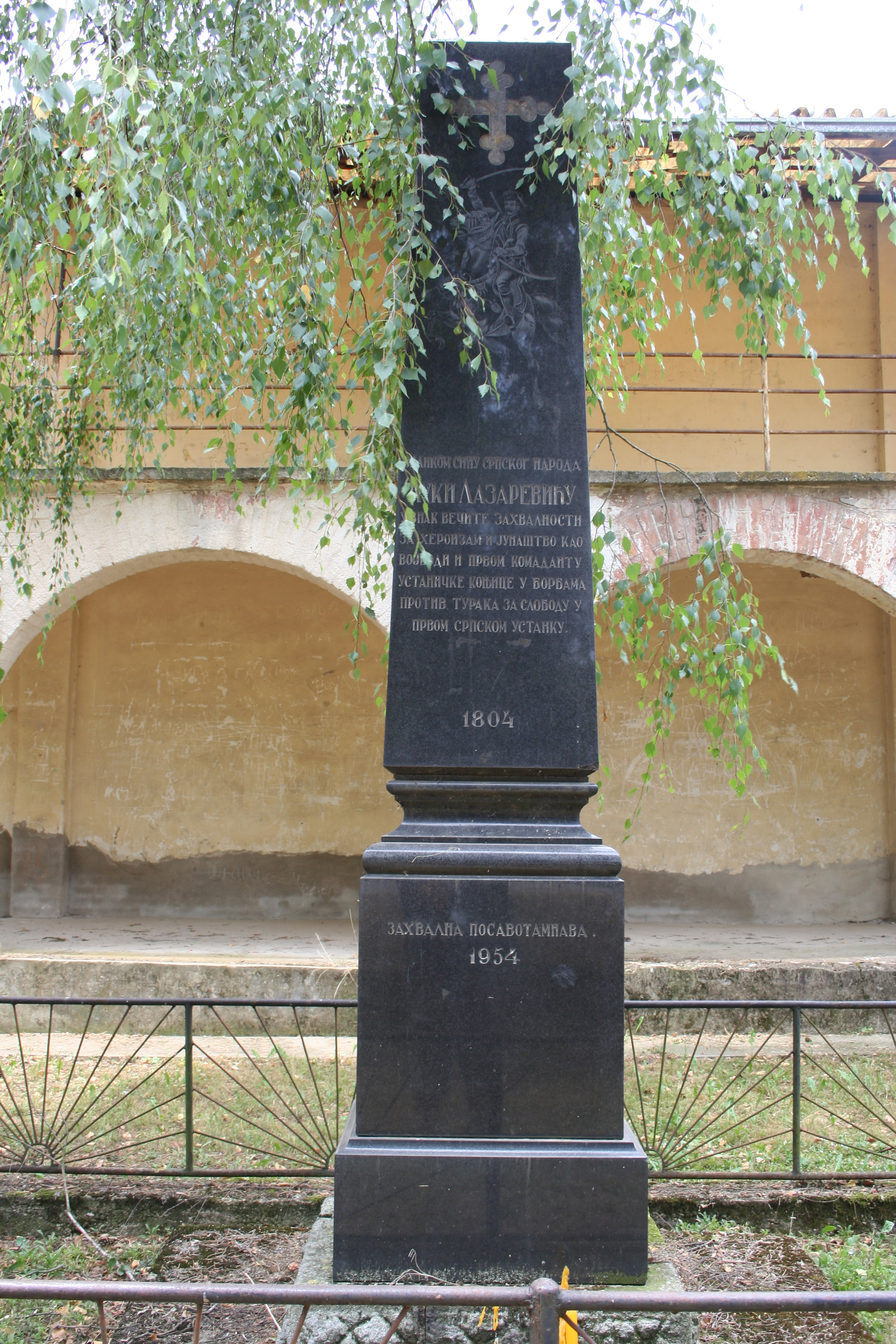 Spomenik popu Luki Lazareviću, , Svileuva